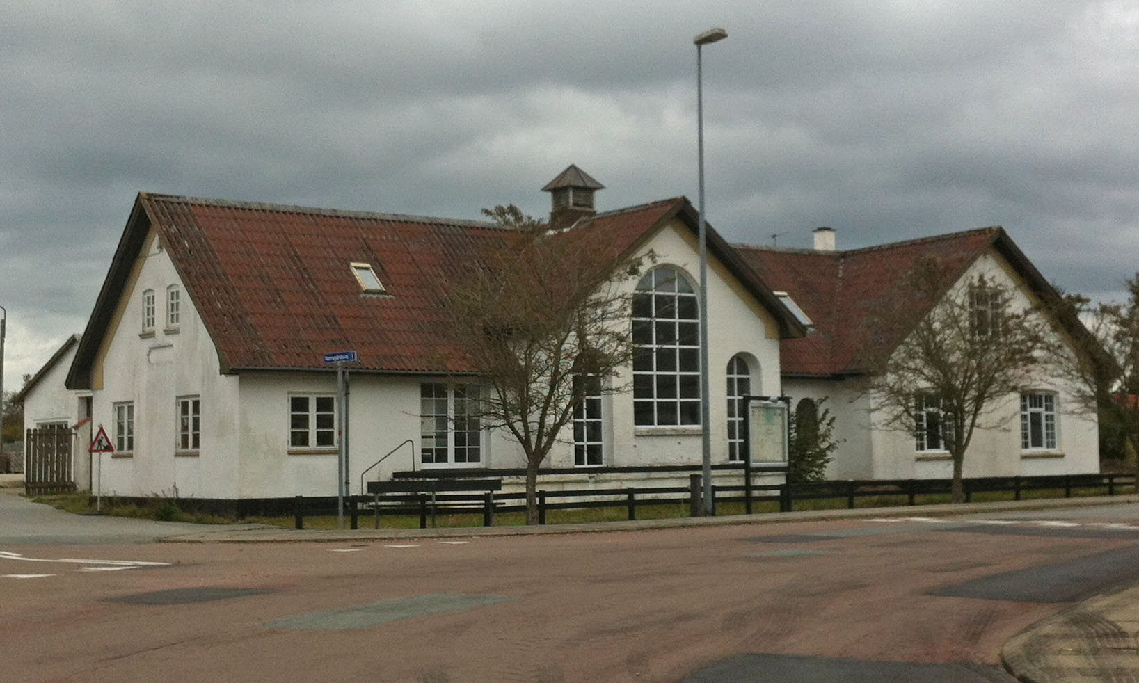 Lørslev gamle mejeri